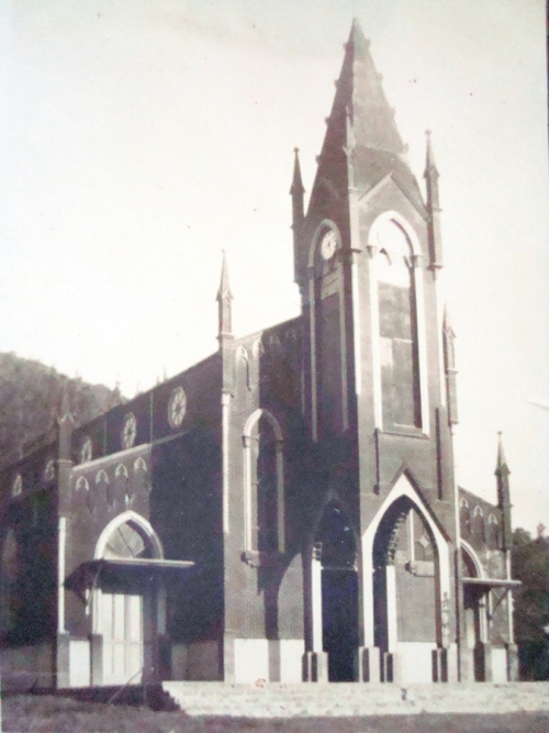 Iglesia gótica de San Ignacio de Acosta en 1910.